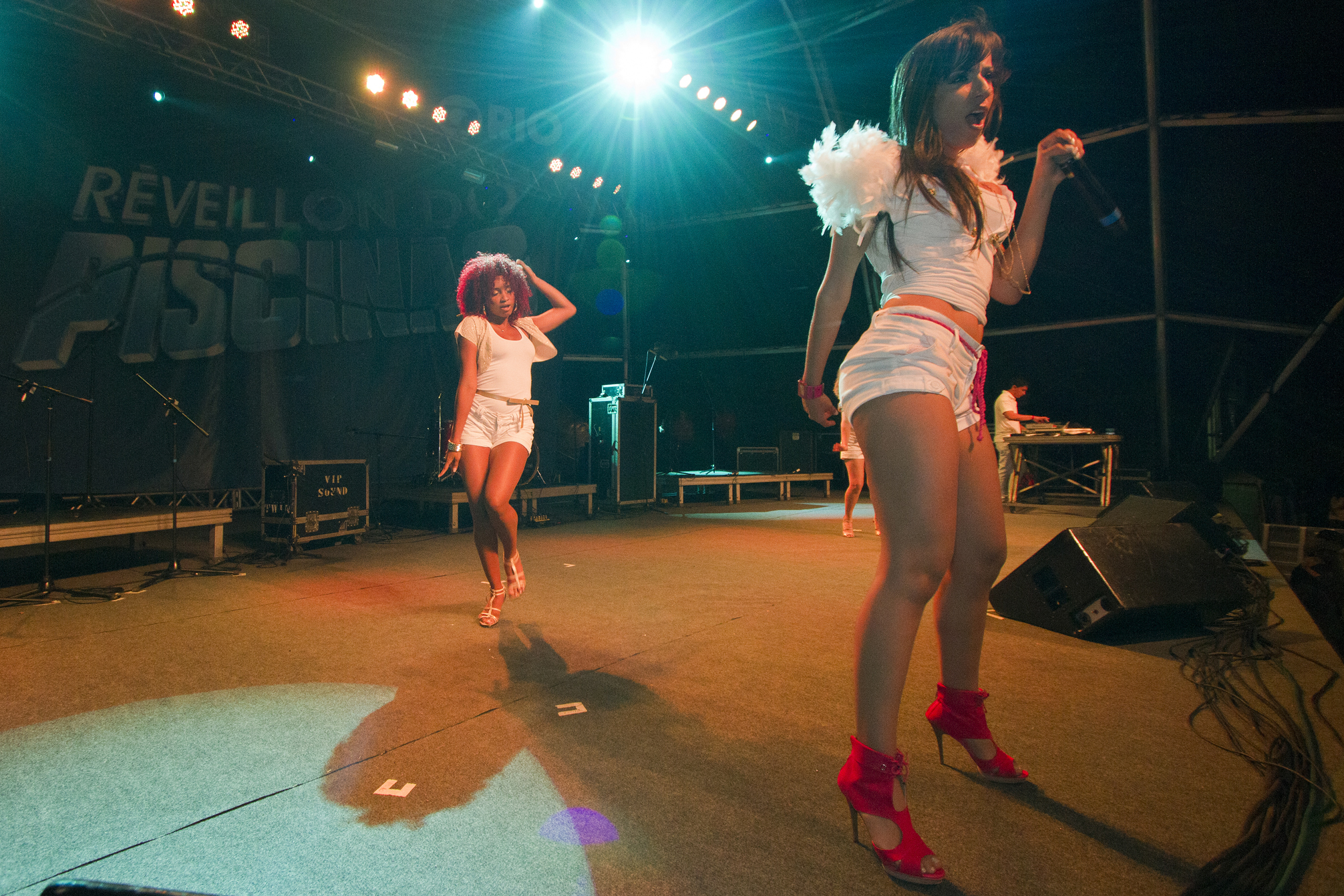 MC Anita - Revéillon 2011/12